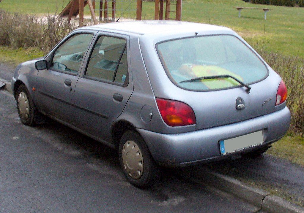 Ford Fiesta